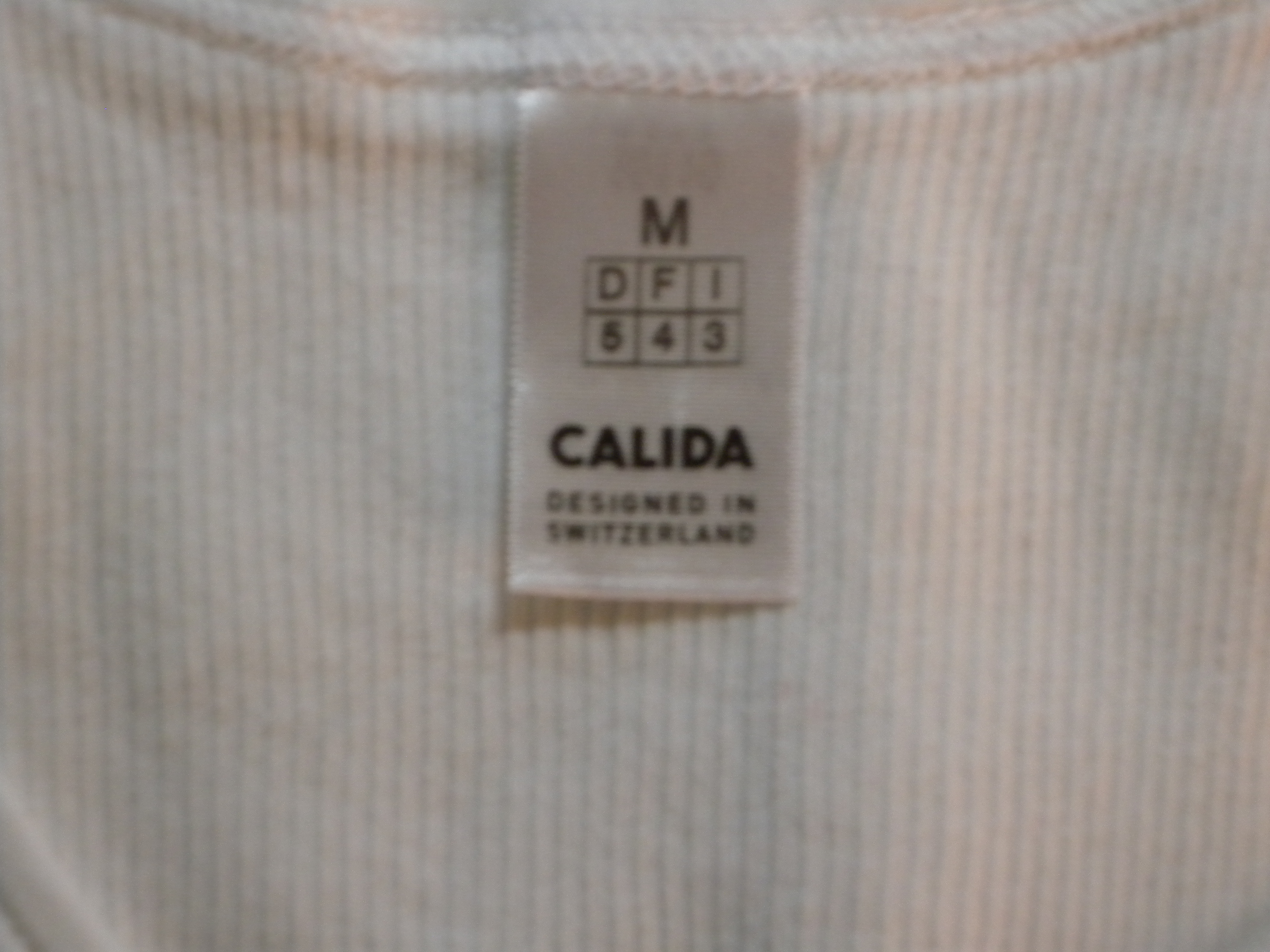 Etikett auf einem Männerunterhemd der Marke Calida